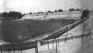 Estadio de Nervión, en la ciudad de Sevilla (España), existente entre 1928 y 1956